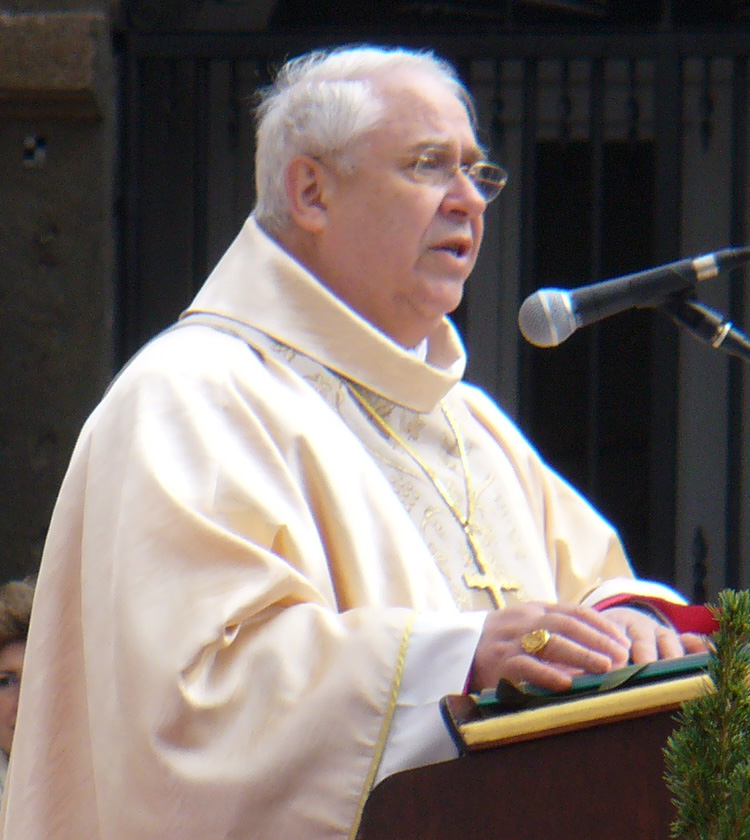 Cardinale Domenico Calcagno, Presidente dell’Amministrazione del Patrimonio della Sede Apostolica e Arcivescovo-Vescovo Emerito della Diocesi di Savona-Noli.